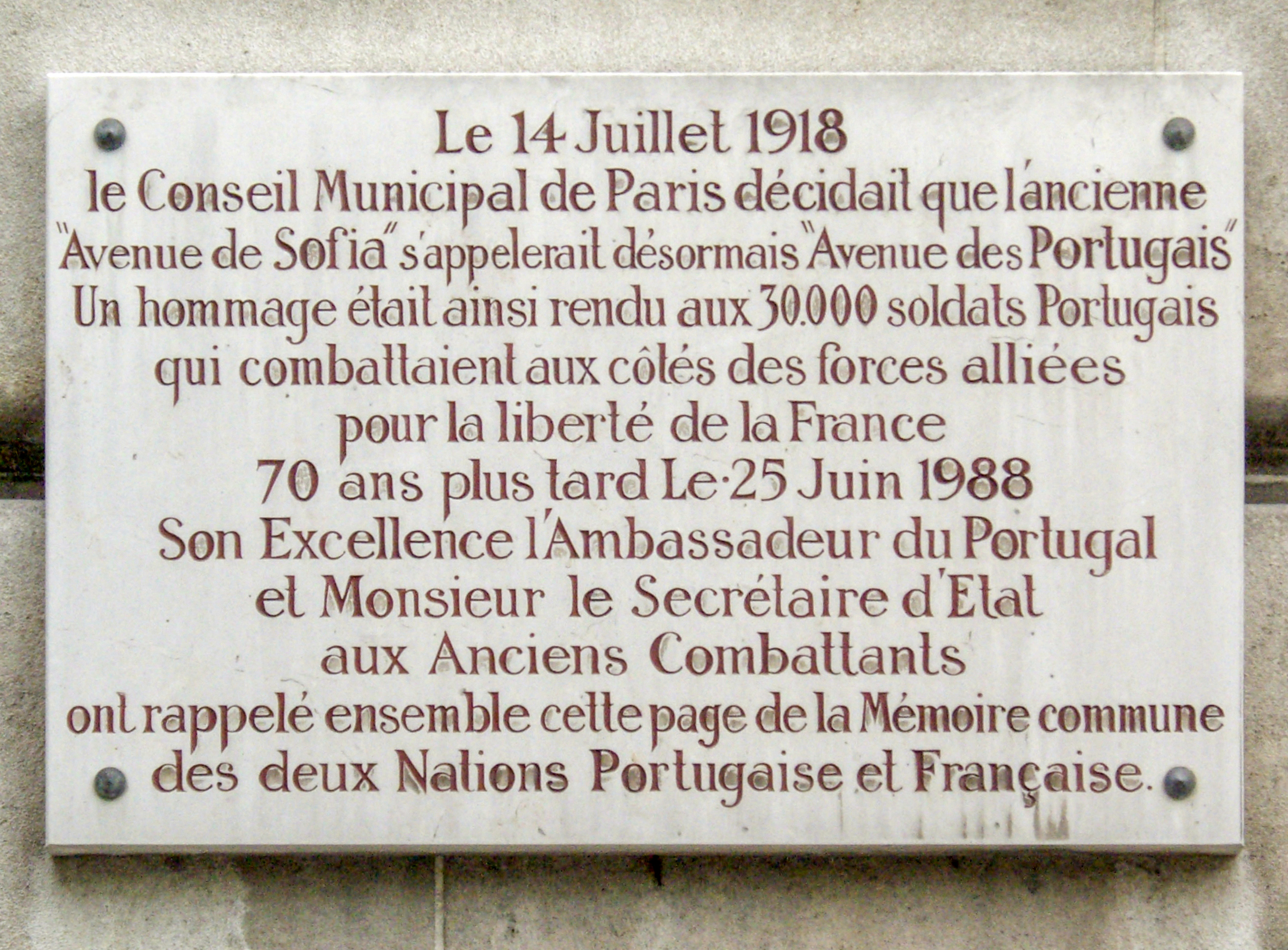 Plaque apposée en 1988 à l'entrée de l'ancienne avenue de Sofia, Paris 16e, devenue avenue des Portugais le 14 juillet 1918 en hommage au 30.000 soldats portugais qui combattirent aux côtés des forces alliées pour la liberté de la France.